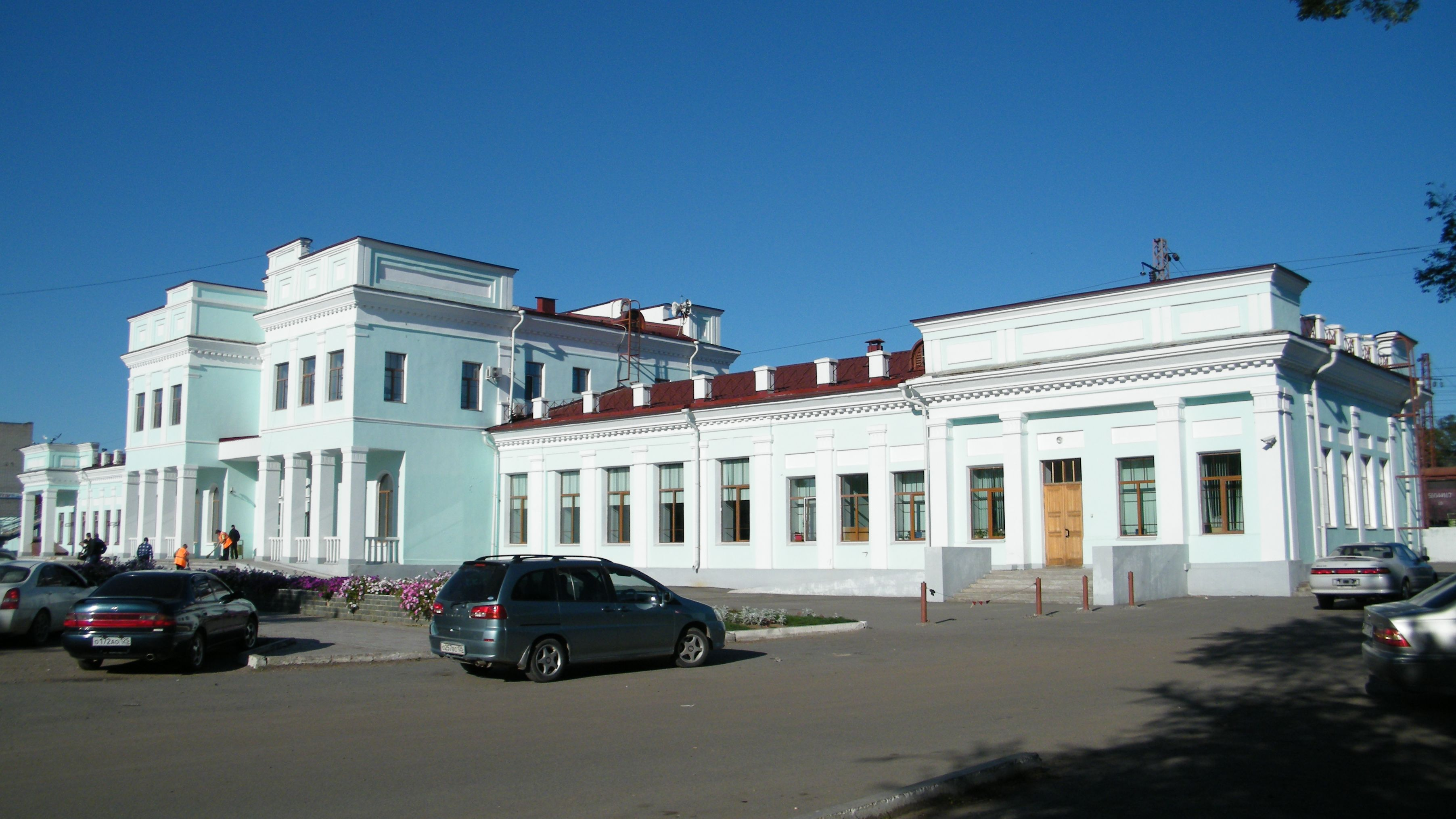 Станция Уссурийск